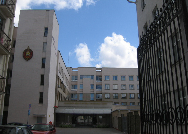 Академия МВД РБ